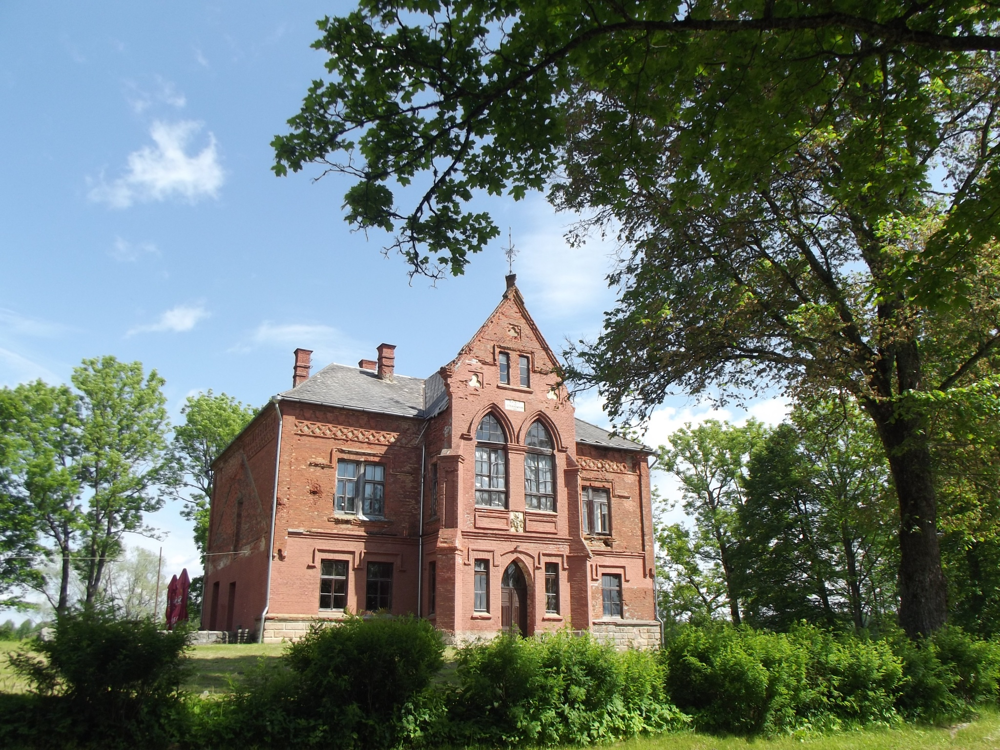 Cirstu muiža